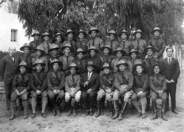 זאב ז'בוטינסקי בתל אביב חברת מפקדי בית"ר בארץ ישראל, ב. לימינו יושב מנחם ארבר, בשורה האמצעית עומד שני מימין לשמאל: חיים אליהו